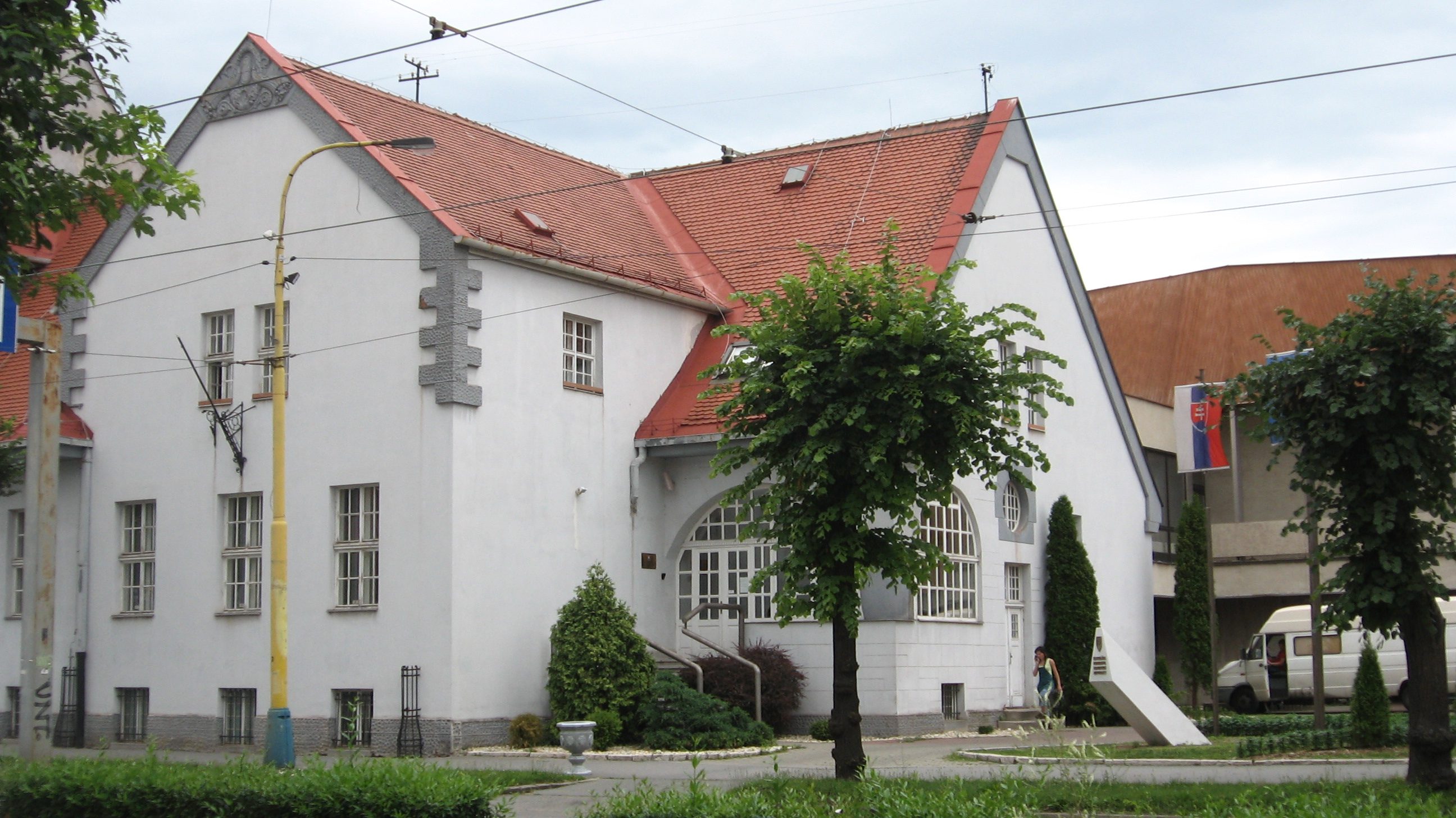 Kancelária prezidenta SR - pracovisko Košice